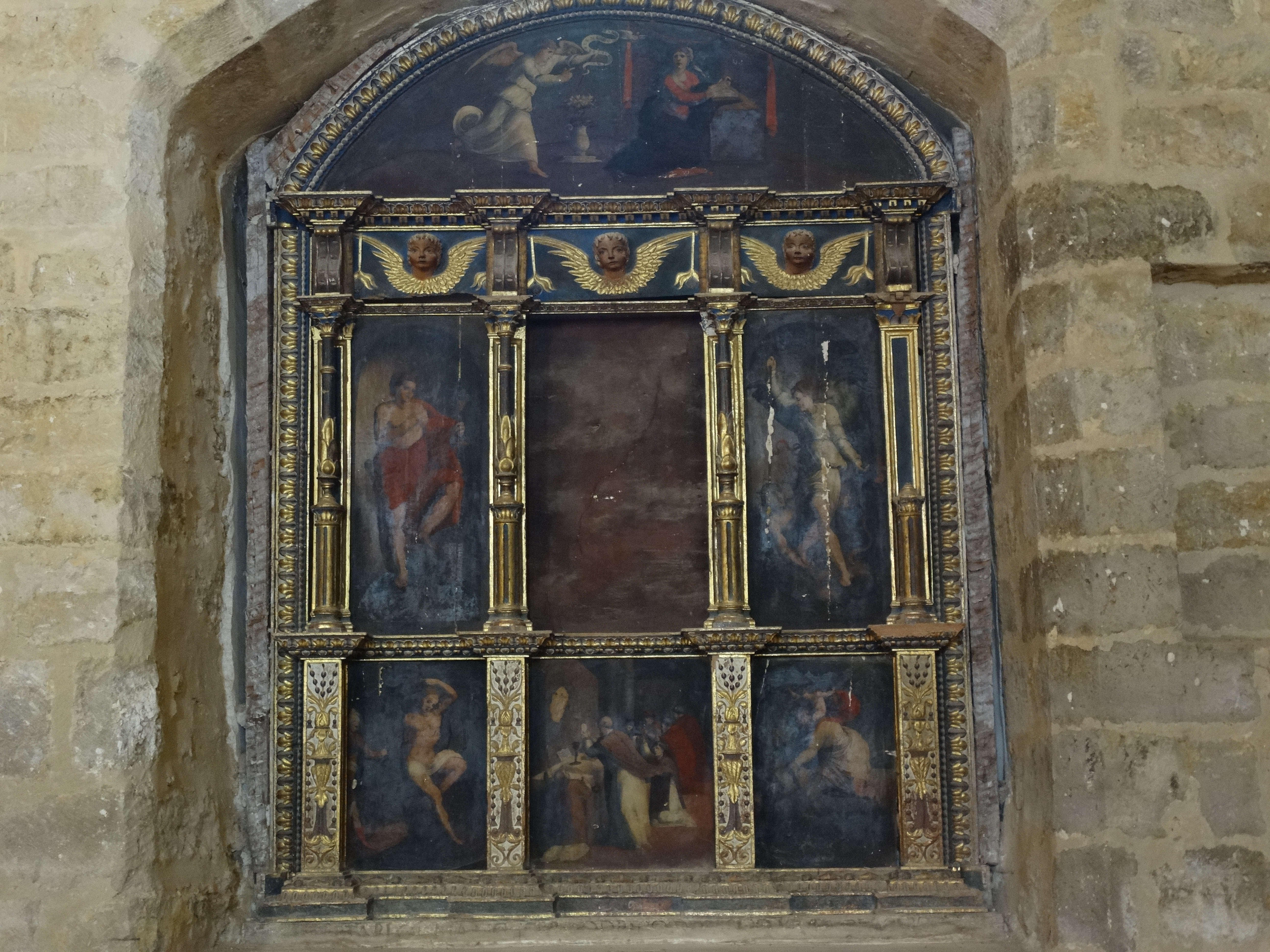 Torremormojón, provincia de Palencia, España. Iglesia de Santa María del Castillo. Retablo de Juan de Villoldo.